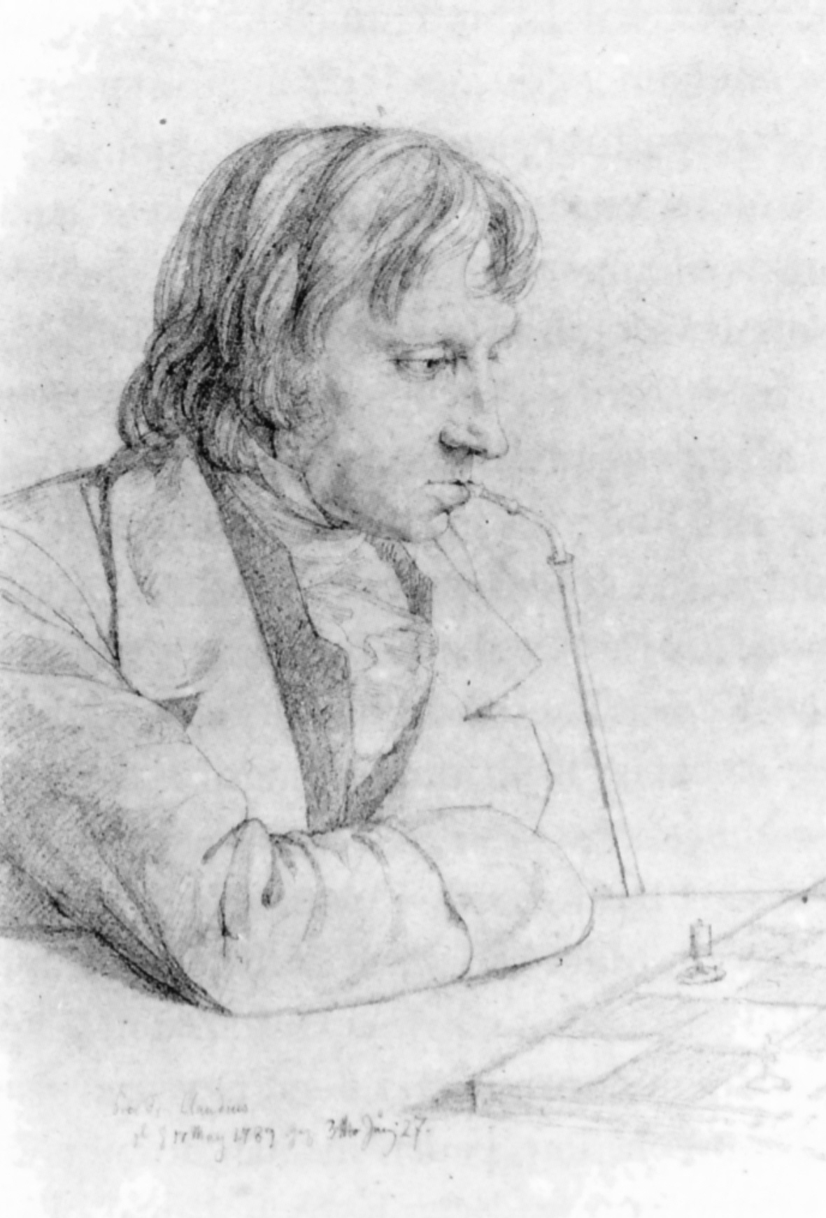 Friedrich Matthias Jacobus Claudius (1789-1861), Lübecker Bürgermeister